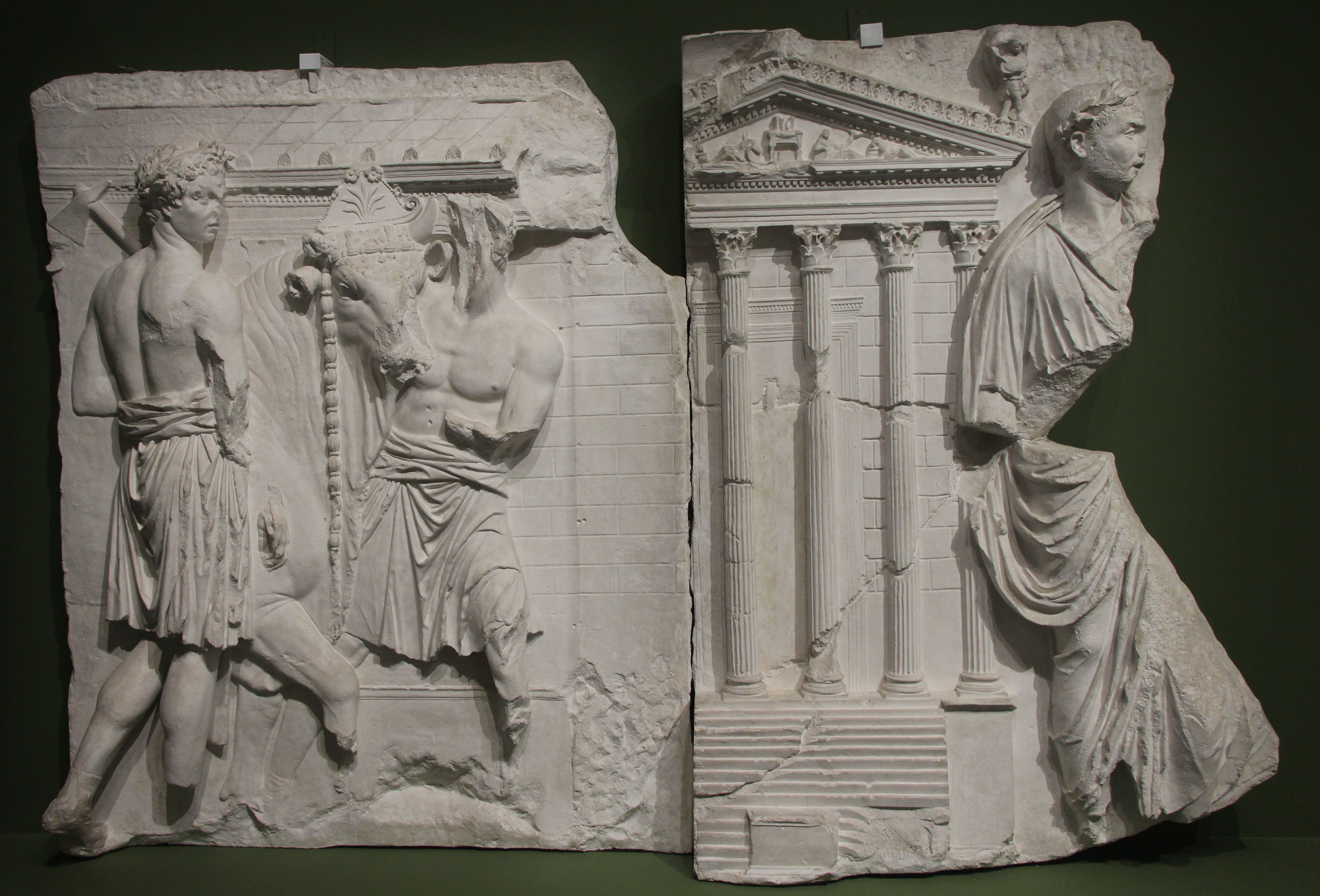 Procession sacrificielle devant le temple de la Magna Mater sur le Palatin, moulages découverts à Rome, près de l'église Santa Maria in Via Lata en 1583.